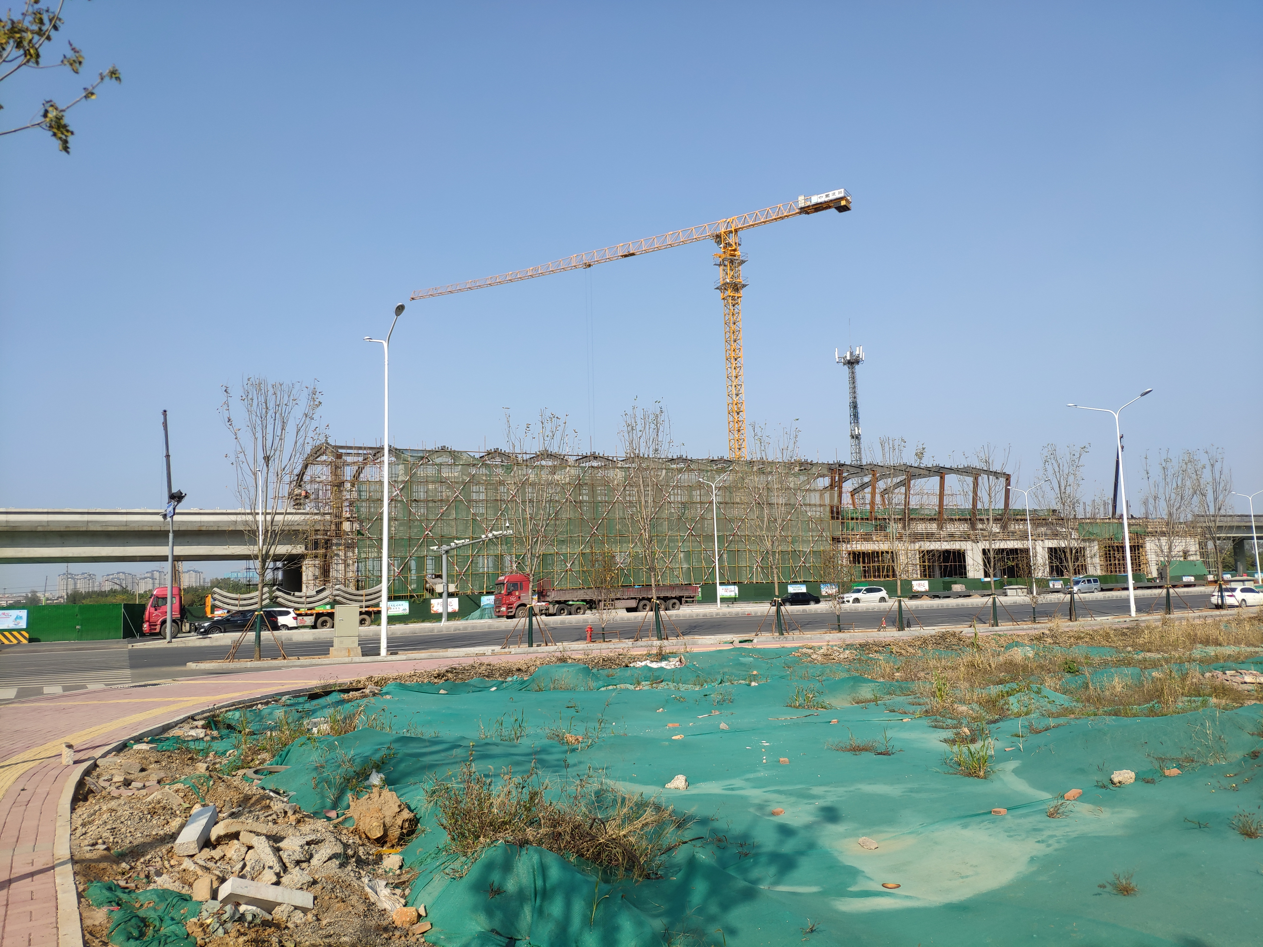 济南地铁2号线彭家庄站（修建中）